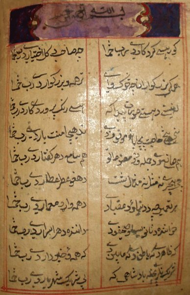 پښتو: دا د رحمان بابا د لاسي نسخې يو انځور دی چې د پخوانيو دېوانونو د کتاب نه يې انځور کښل شوی.